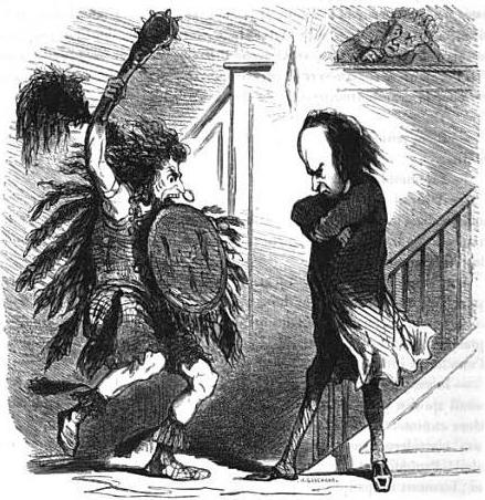 Conflit entre Jean-Martial Bineau (ici déguisé en "Ioway"), rapporteur de la commission du budget rectifié de 1848, et Victor Hugo, à propos d'une réduction du budget des Beaux-Arts (Assemblée nationale constituante, séance du 11 novembre 1848).